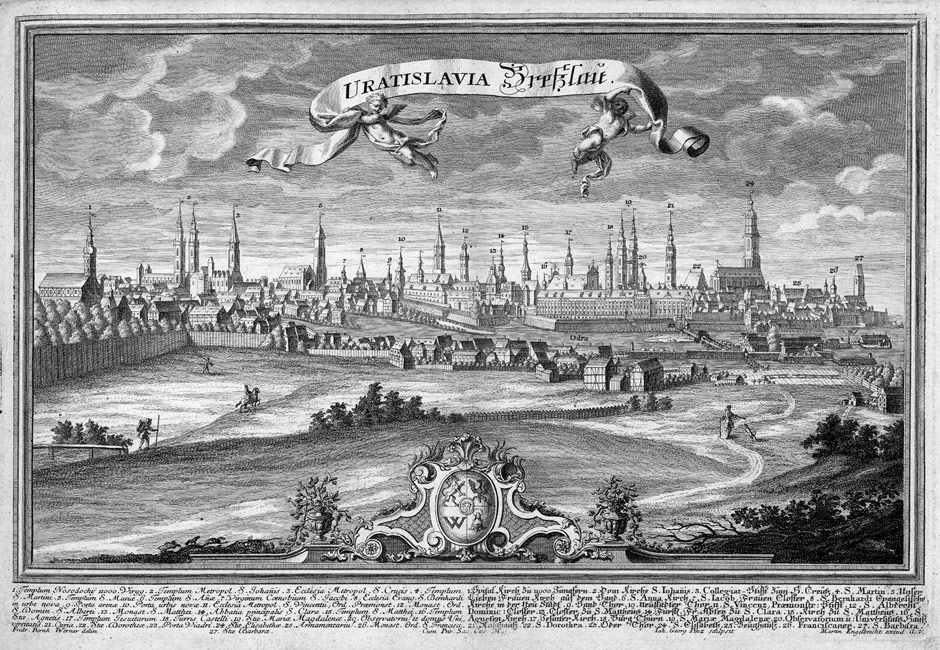 Breslau (Wrocław), aus: Friedrich Bernhard Werner: Accuratum ectypum & repraesentatio … illustrissimae urbis Vratislaviae in Silesia inferiore, Kupfertafeln von Carl Remshart und Johann Matthias Steidlin nach Friedrich Bernhard Werner. Augsburg, Martin Engelbrecht, o. J. (um 1736)